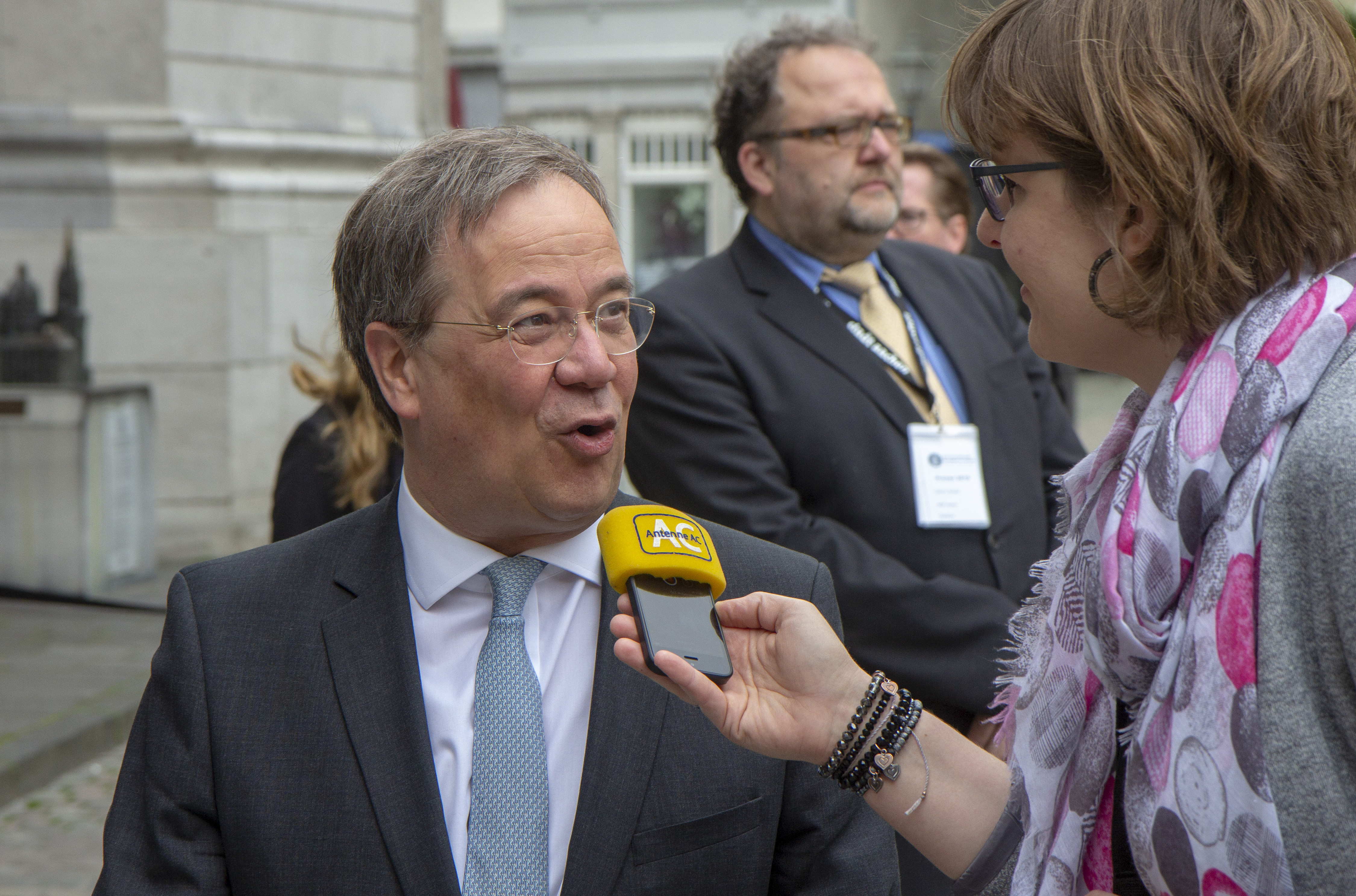 Armin Laschet vor dem Aachener Dom im Rahmen des Karlspreises 2019 am 30. Mai 2019 in Aachen.